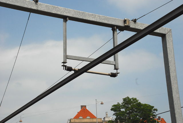 De bovenleiding van de S-tog in Københavns Hovedbanegård bestaat niet uit een rij draad maar is gemaakt van een aluminium-rails.